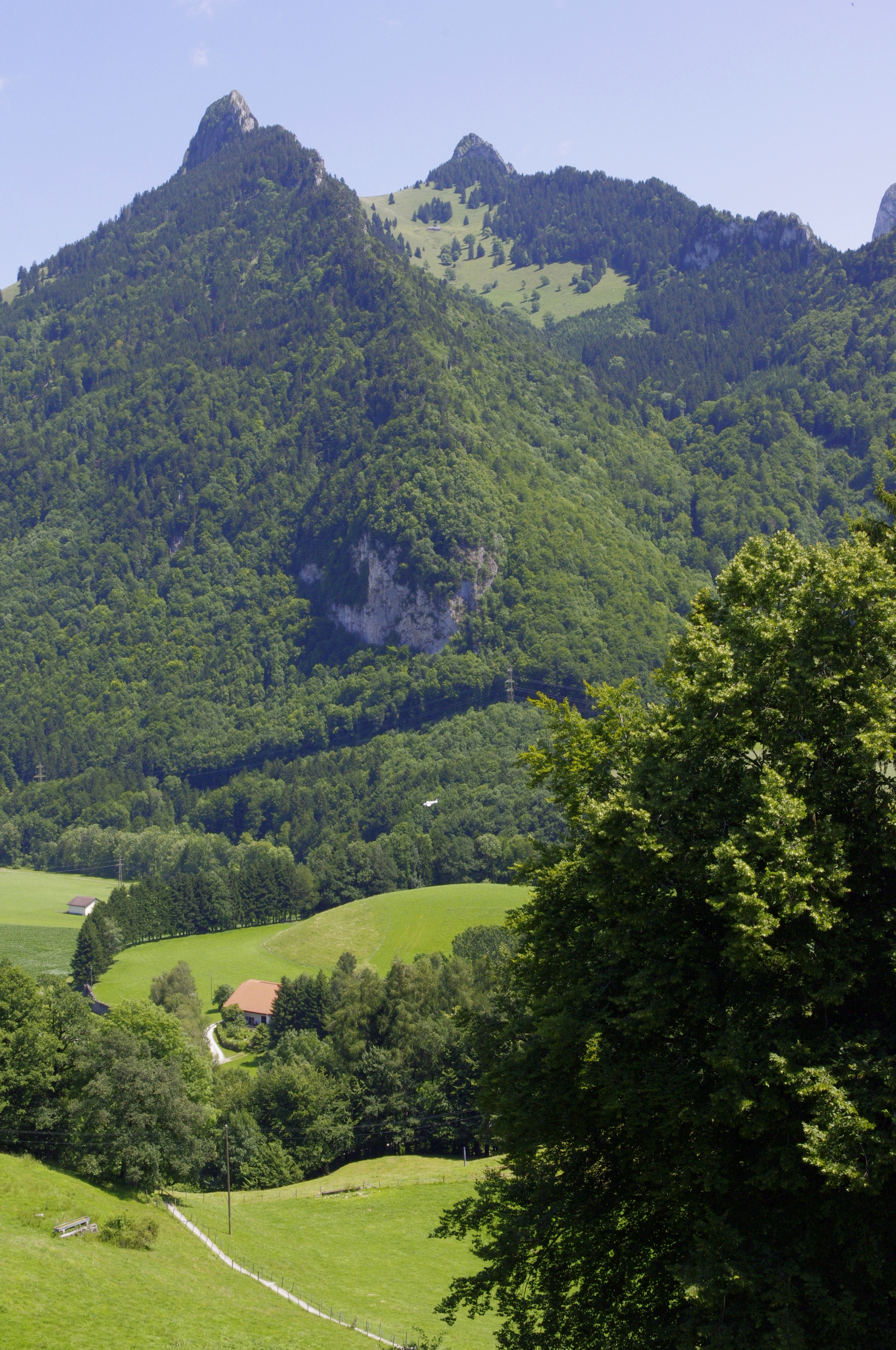 Vue sur le paysage autour de la ville de Gruyère, Suisse: Barrage de Gruyère - A1760 Iris (Les Marches)